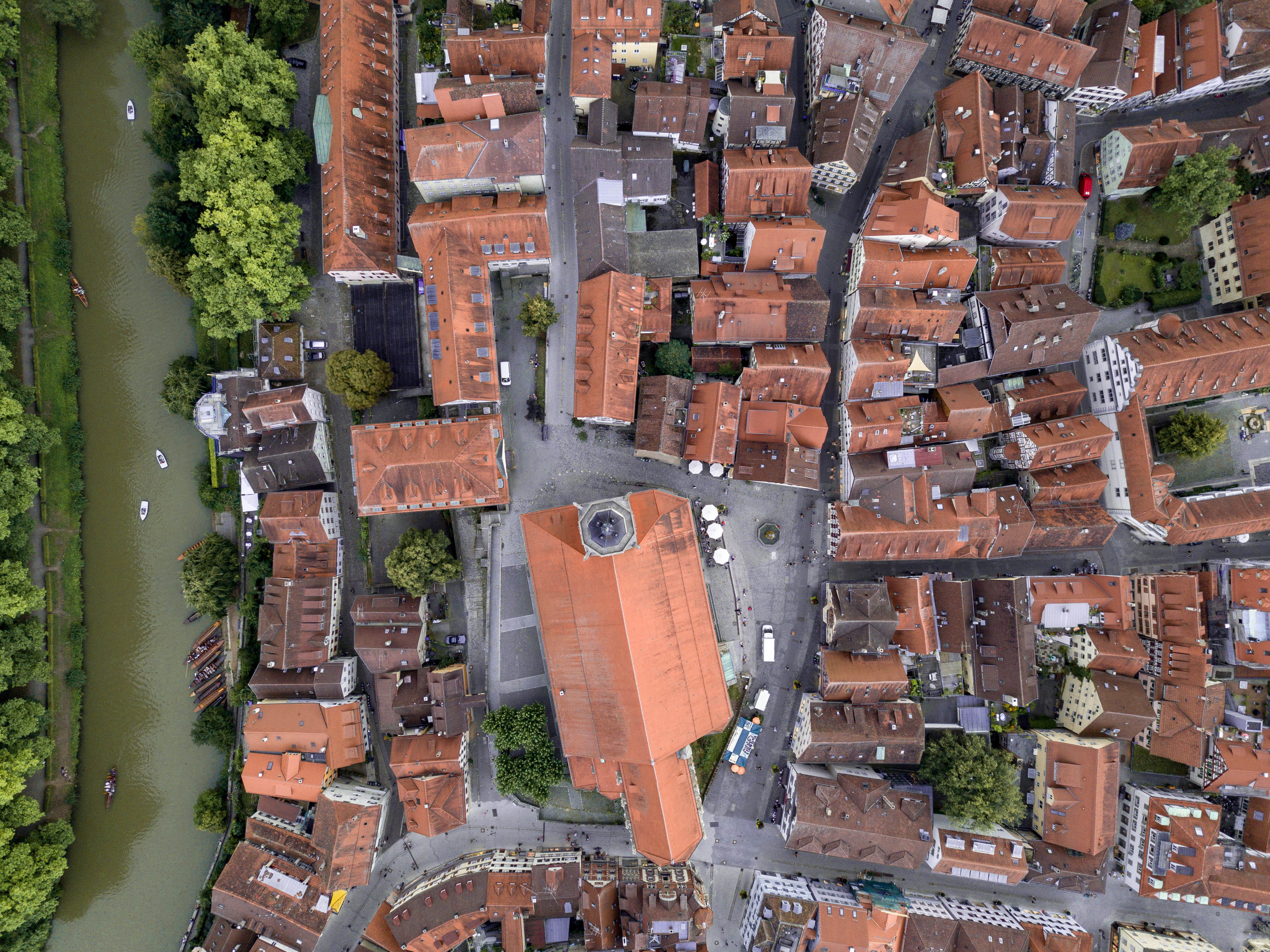 Stiftskirche in Tübingen Holzmarkt Neckargasse Bursagasse Clinicumsgasse Münzgasse